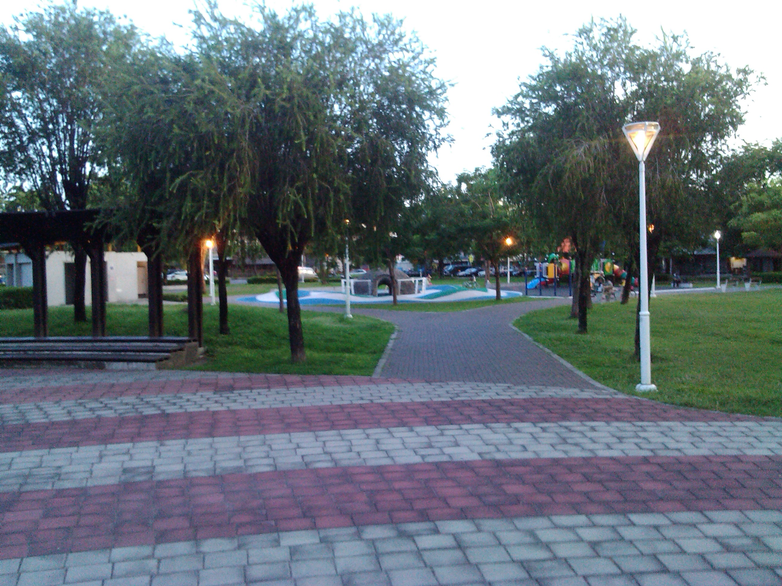 位於彌陀市區 毗鄰彌陀公立圖書館